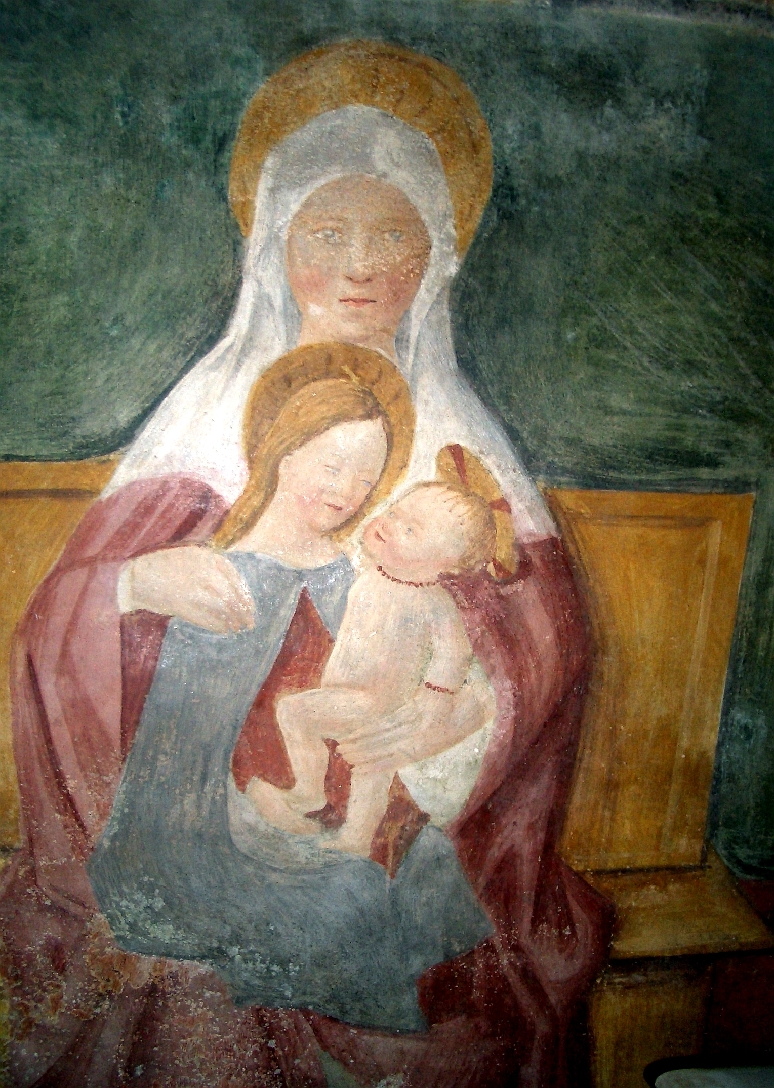 San Pietro Vecchio church , Follower of Martino Spanzotti, Sant’Anna metterza, Favria, Turin, Italy